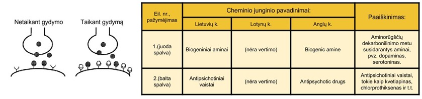 Neuraleptikų veikimo principas